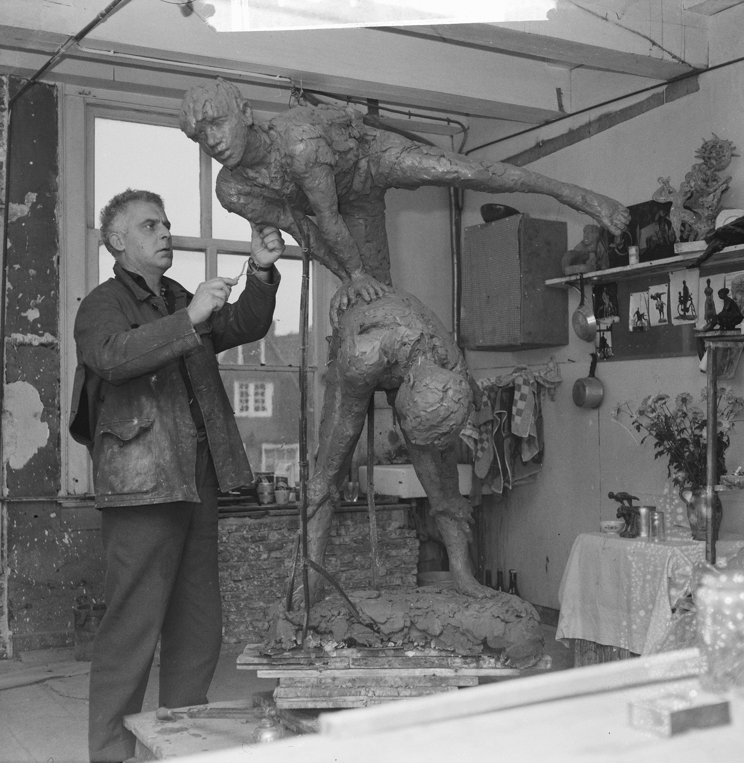 Collectie / Archief : Fotocollectie Anefo Reportage / Serie : Beeld "bokspringende jongens" van beeldhouwer en schilder Hans Bayens te Amsterdam Beschrijving : Bayens tijdens het werken aan zijn beeld Datum : 18 november 1965 Locatie : Amsterdam, Noord-Holland Trefwoorden : ateliers, beeldhouwers, beeldhouwkunst, beeldhouwwerken Persoonsnaam : Bayens, Hans Fotograaf : Kroon, Ron / Anefo Auteursrechthebbende : Nationaal Archief Materiaalsoort : Negatief (zwart/wit) Nummer archiefinventaris : bekijk toegang 2.24.01.03 Bestanddeelnummer : 918-4617